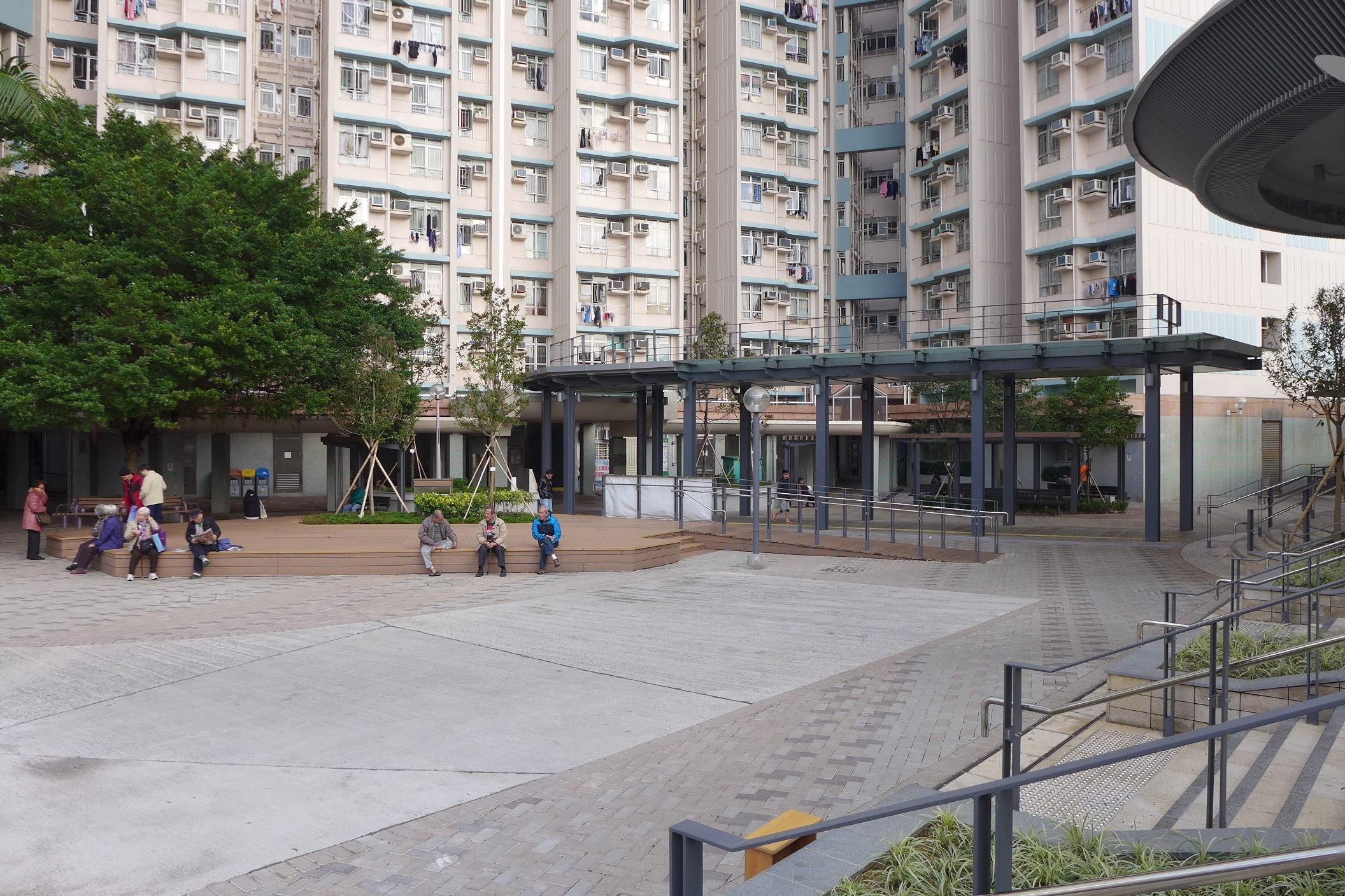 Yau Tong Estate Open Plaza